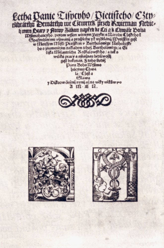 Závěr Bible z roku 1549 se signety Netolického a Melantricha